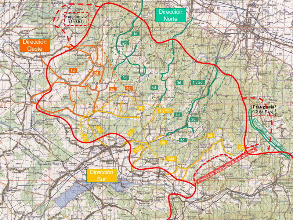 Desarrollo de la operación Otkos 10. Mapa confeccionado sobre la base de Crkvenac, Đuro; Kovačević, Franjo (2014). «Vojna operacija Otkos - 10: Planiranje, izvođenje i rezultati». Radovi Zavoda za znanstvenoistraživački i umjetnički rad u Bjelovaru (en croata) (8): 471-488. ISSN 1846-9787. Consultado el 2019-03-17.